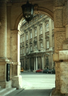 Blick zum Stadtpalais Liechtenstein in Wien, Österreich